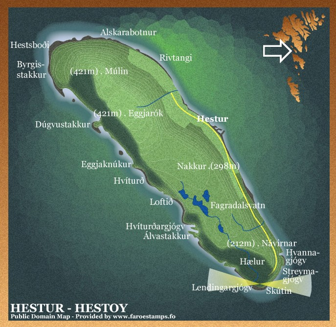 Hestur, Faroe Islands